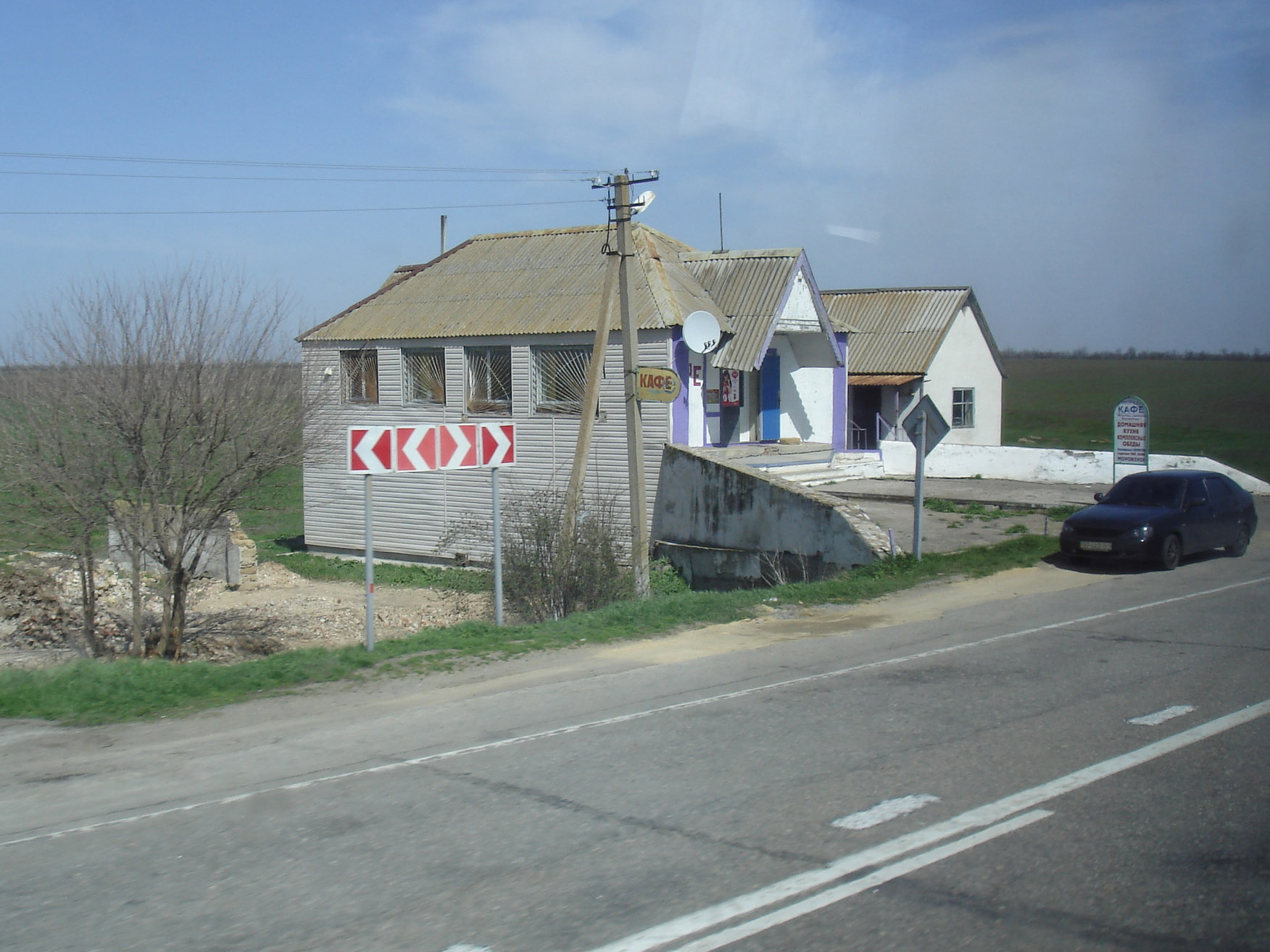 Кафе возле села Петровка на автодороге М-14